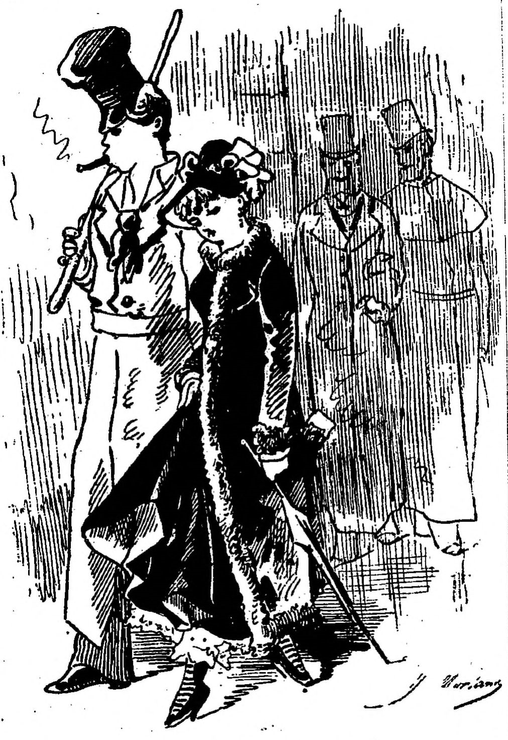 Souteneur et prostituée (1879) - Titre : Un protecteur de Carême